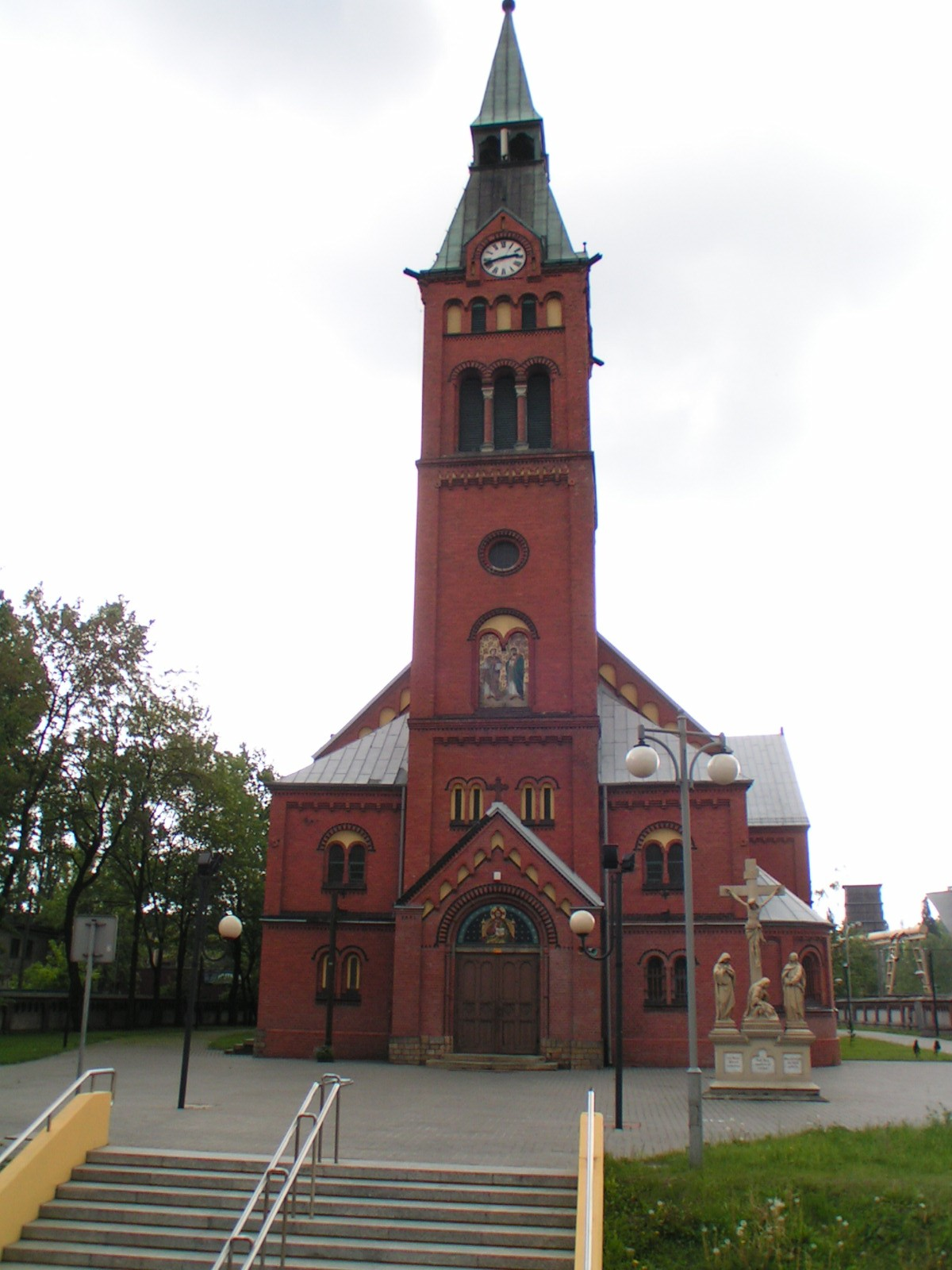 Kościół św. Jana i Pawła w Dębie - Katowice (zabytek nr rejestr. A/115/04)